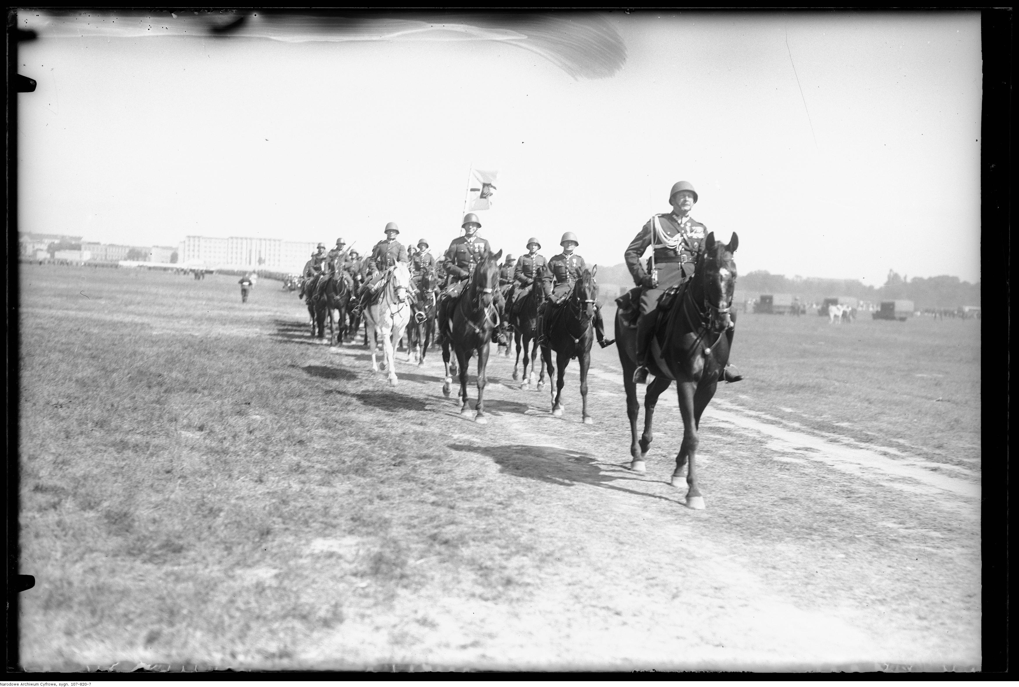 Defilada - sztab 28 Dywizji Piechoty.